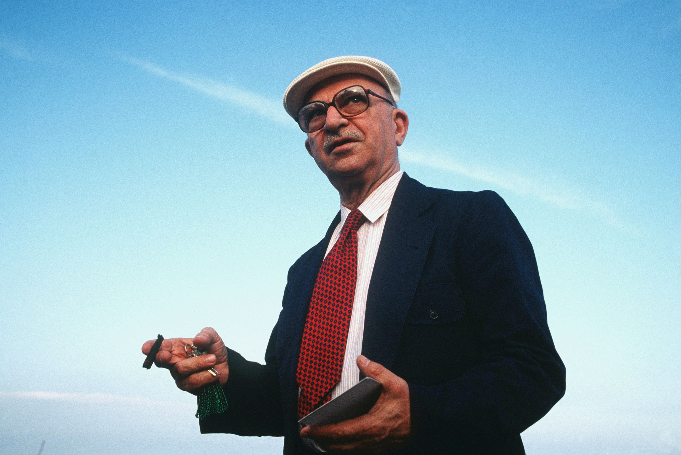 Il regista Alberto Lattuada alla Mostra del cinema di Venezia del 1991